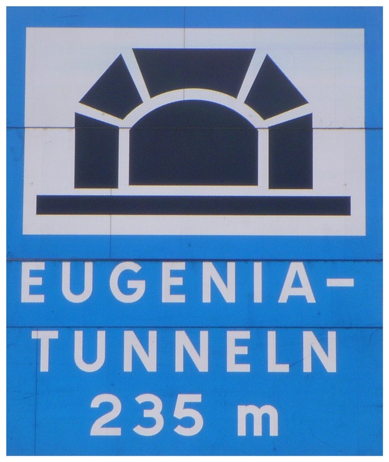 Skylt "Eugeniatunneln" i Stockholm